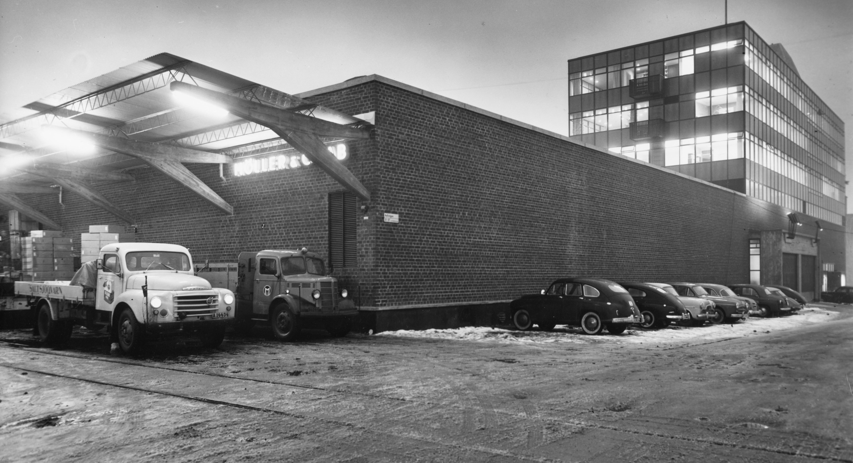 Möller & Co:s fastighet på Slakthusområdet, arkitekt Ralph Erskine och Yngve Fredriksén